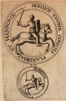 Thomas II of Piedmont